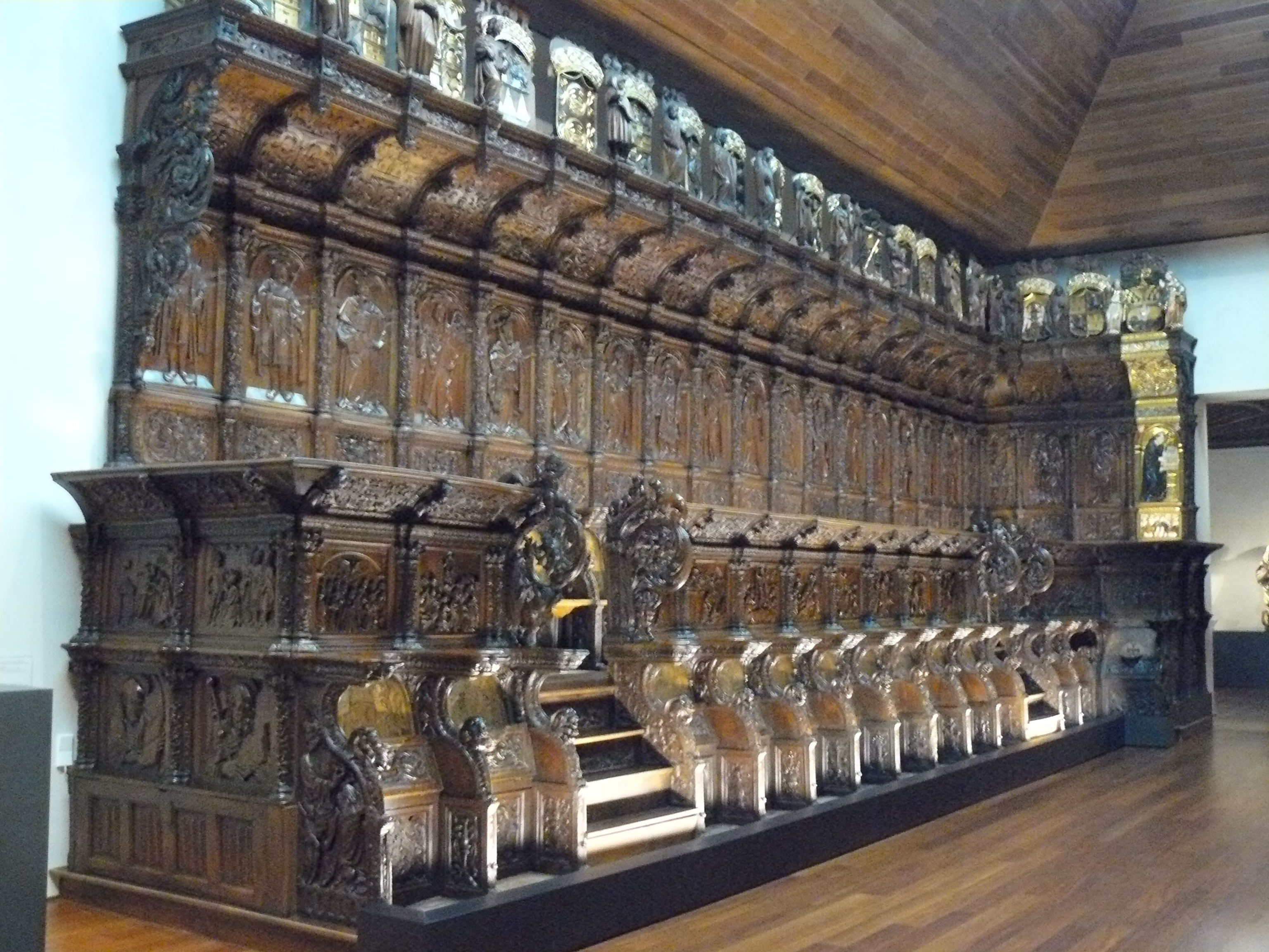 Colegio de San Gregorio , Valladolid.